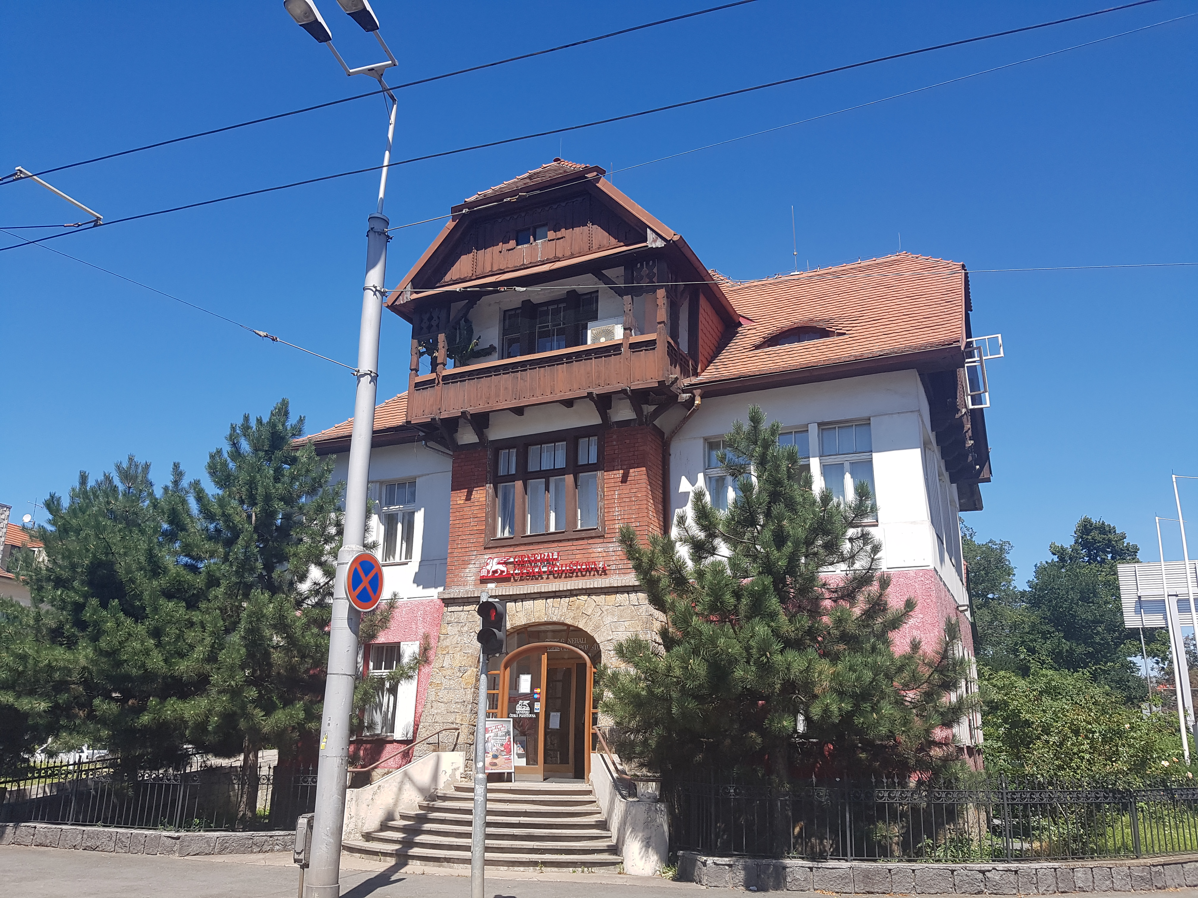 Vila Anička, Hradec Králové, Gočárova třída 492/24.